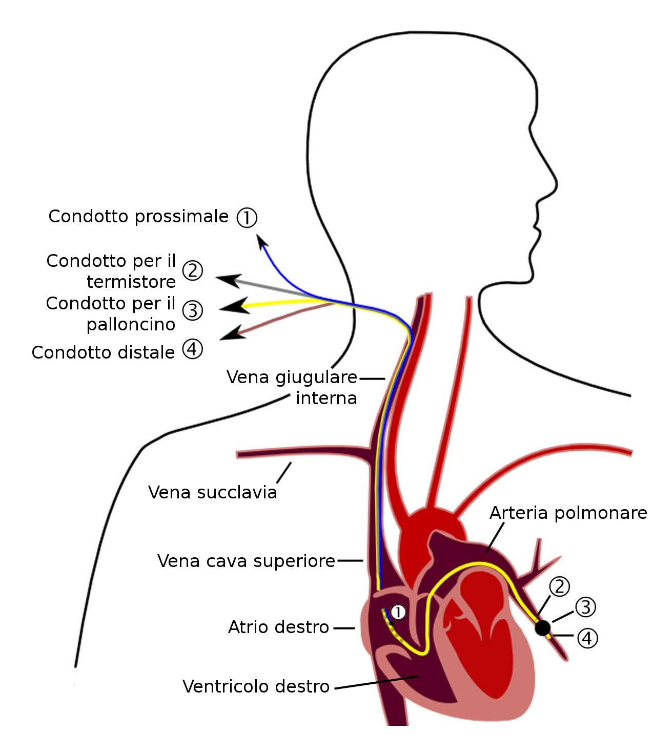 Aufbau eines Pulmonalarterienkatheters (Swan-Ganz-Katheter). Der Katheter beinhaltet vier Lumen. Dies sind der proximale Kanal (1), der im rechten Vorhof zu liegen kommt und u. a. zur Messung des zentralen Venendrucks dient, der Kanal, der zu Temperatursonde führt und eine Kältedilutionsmessung ermöglicht (2), der Kanal zum Aufblasen des Ballons (3) sowie der distale Kanal, mit dem der Druck in der Pulmonalarterie (PAP) sowie der Pulmonalarterienverschlussdruck (PCWP, Wedge-Druck) gemessen wird (4). In diesem Schemabild befindet sich der Katheter in der Wedge-Position, in der der Ballon die Pulmonalarterie verschließt.A simple figure descripting pulmonary artery catheter. Drawn with Inkscape 0.43